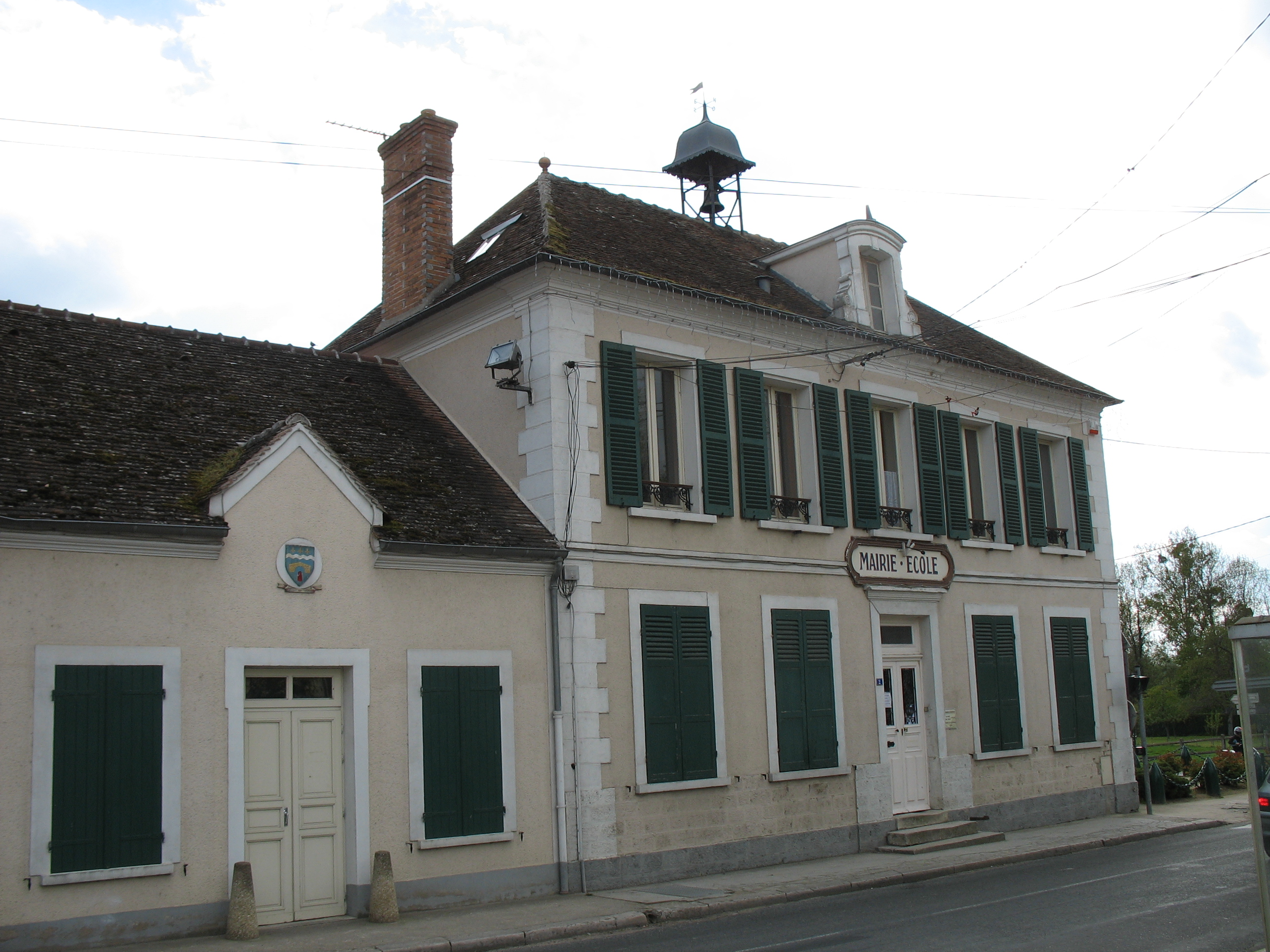 La mairie de Misy sur Yonne